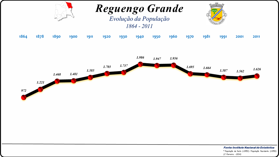 Evolução da População